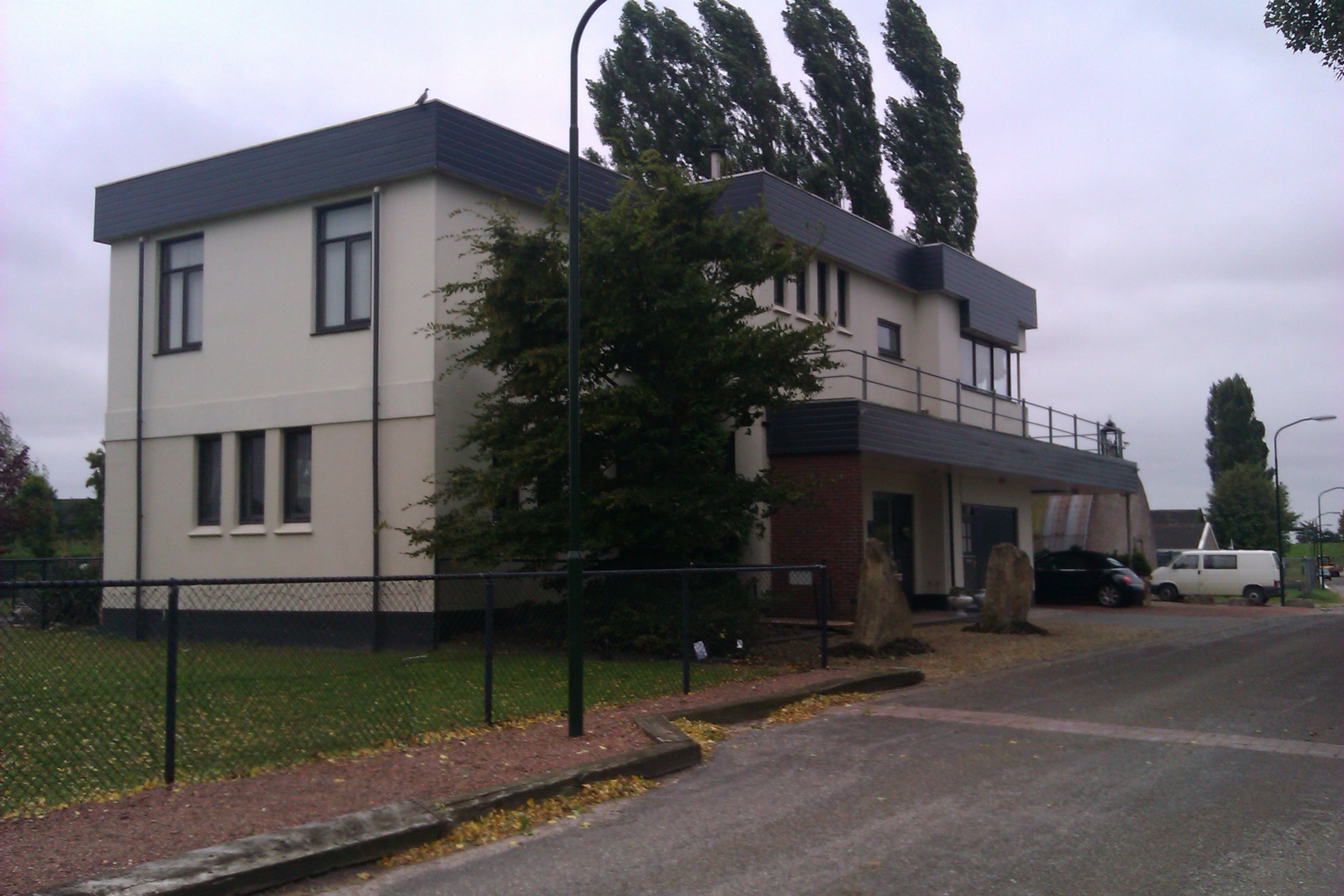 Voormalige stationsgebouw van Zoutkamp, flink verbouw na brand in de jaren 70